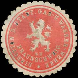 Sealing stamp Title: Direction der Städt. Gas- und Wasser-Werke zu Braunschweig Description: rot, weiß, geprägt Place: Braunschweig size: 4 cm